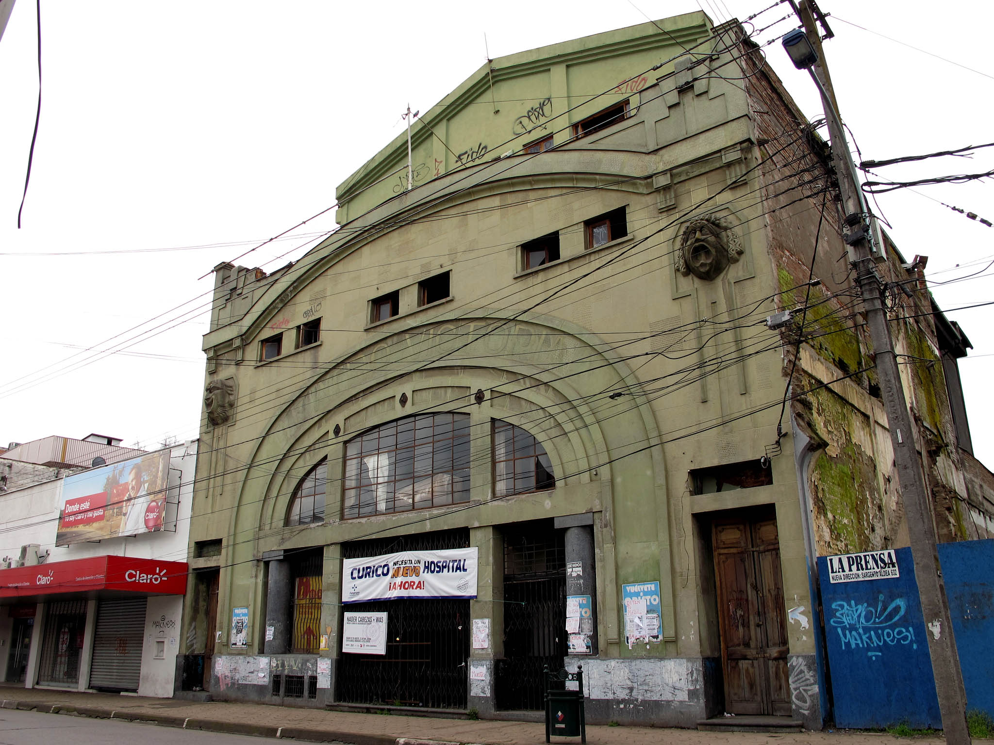 Curico, teatro Victoria abandonado